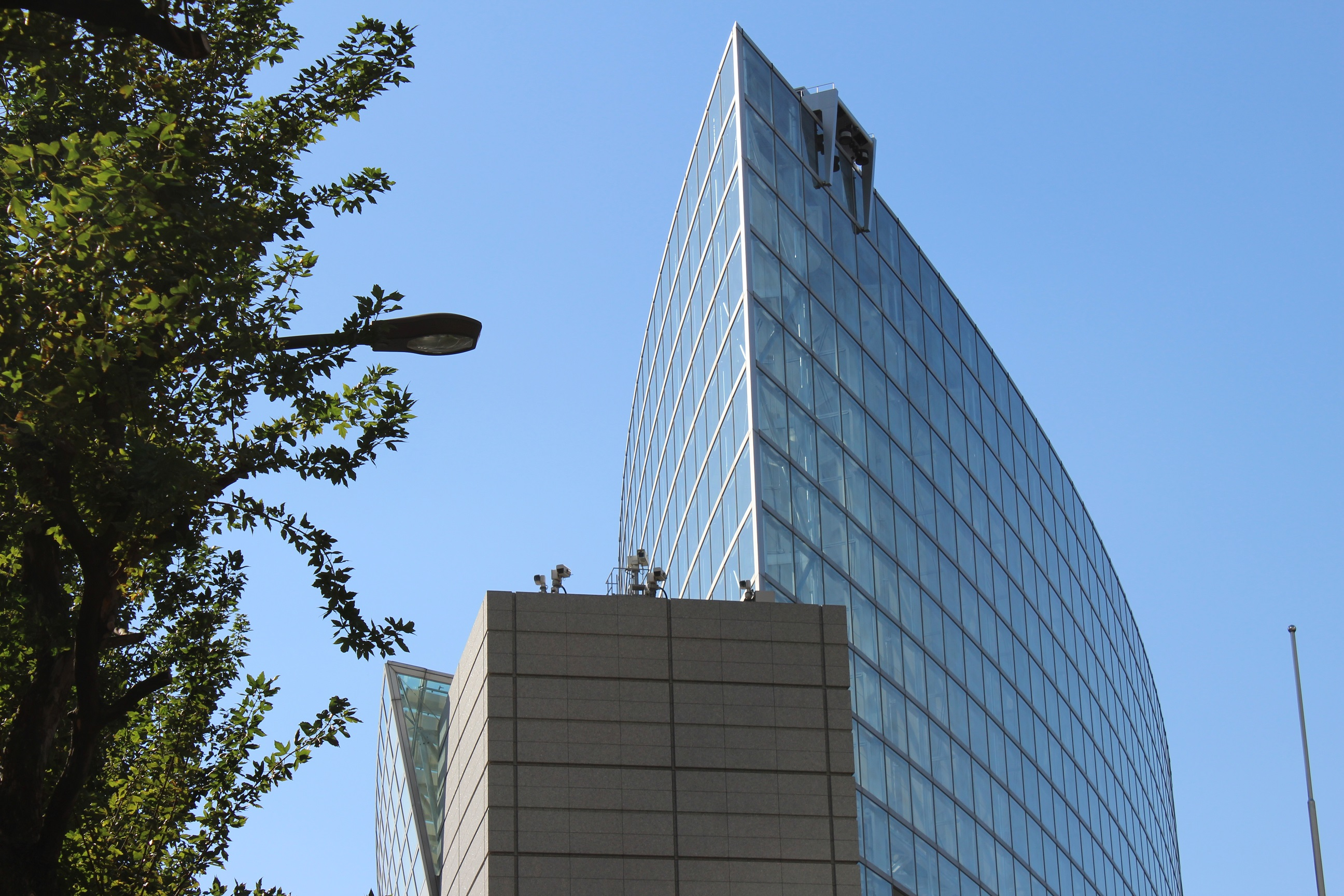 東京駅（東京国際フォーラム）